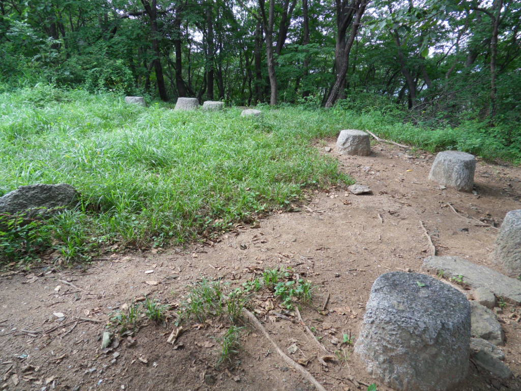 남한산성 남장대터